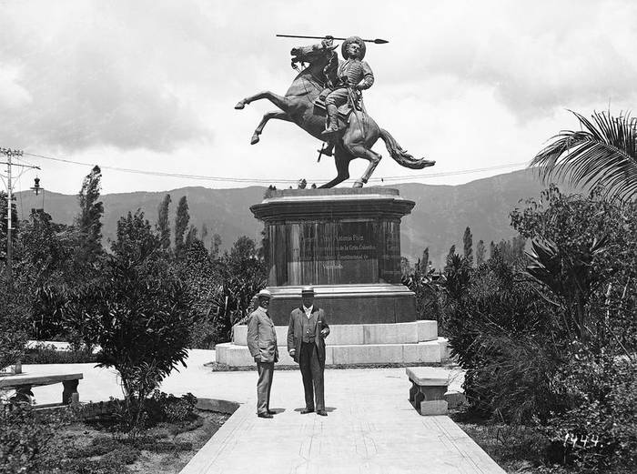 Estatua del general Paez hecha por Perez Mujica en 1910.